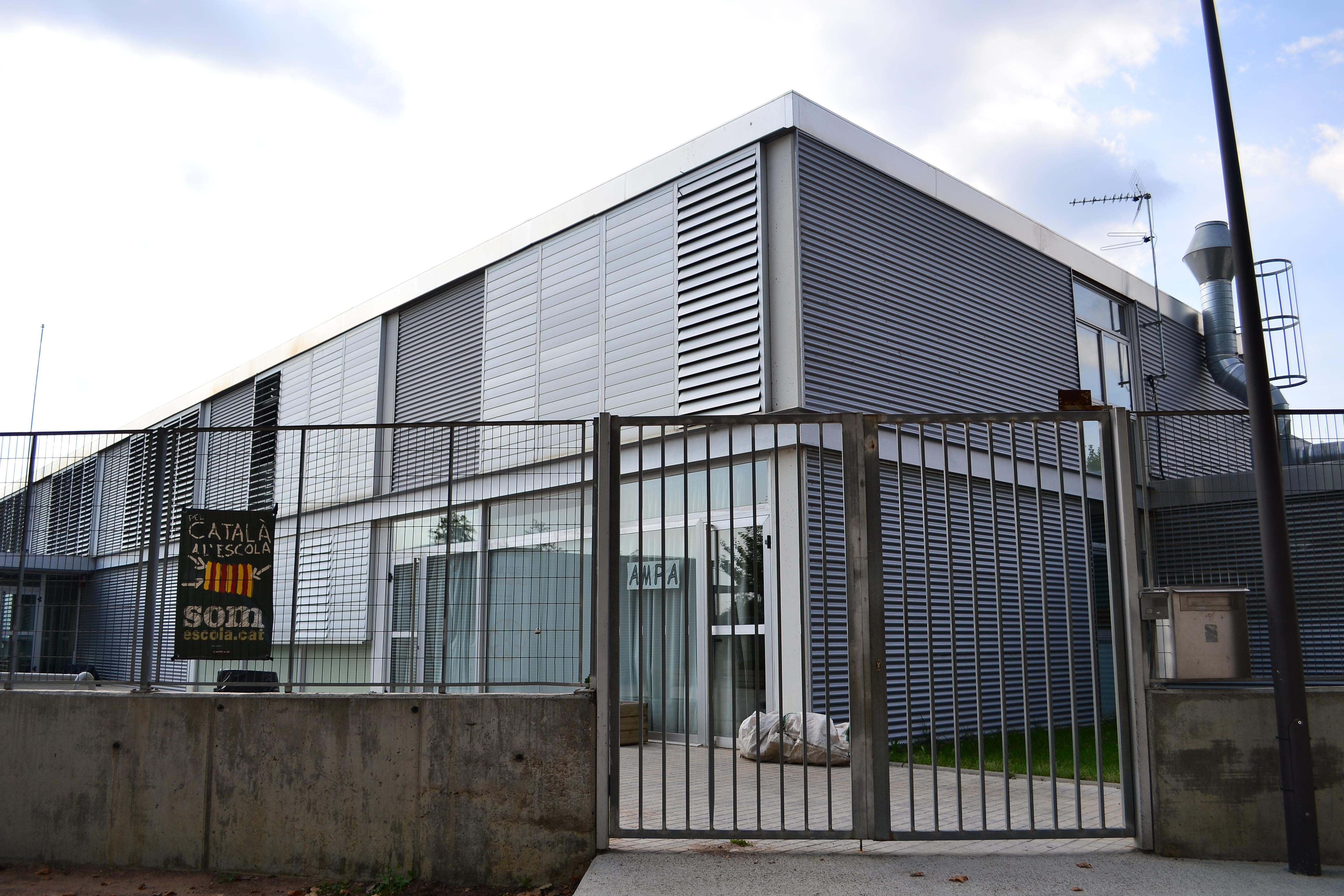 Façana d'entrada a l'escola La Sínia